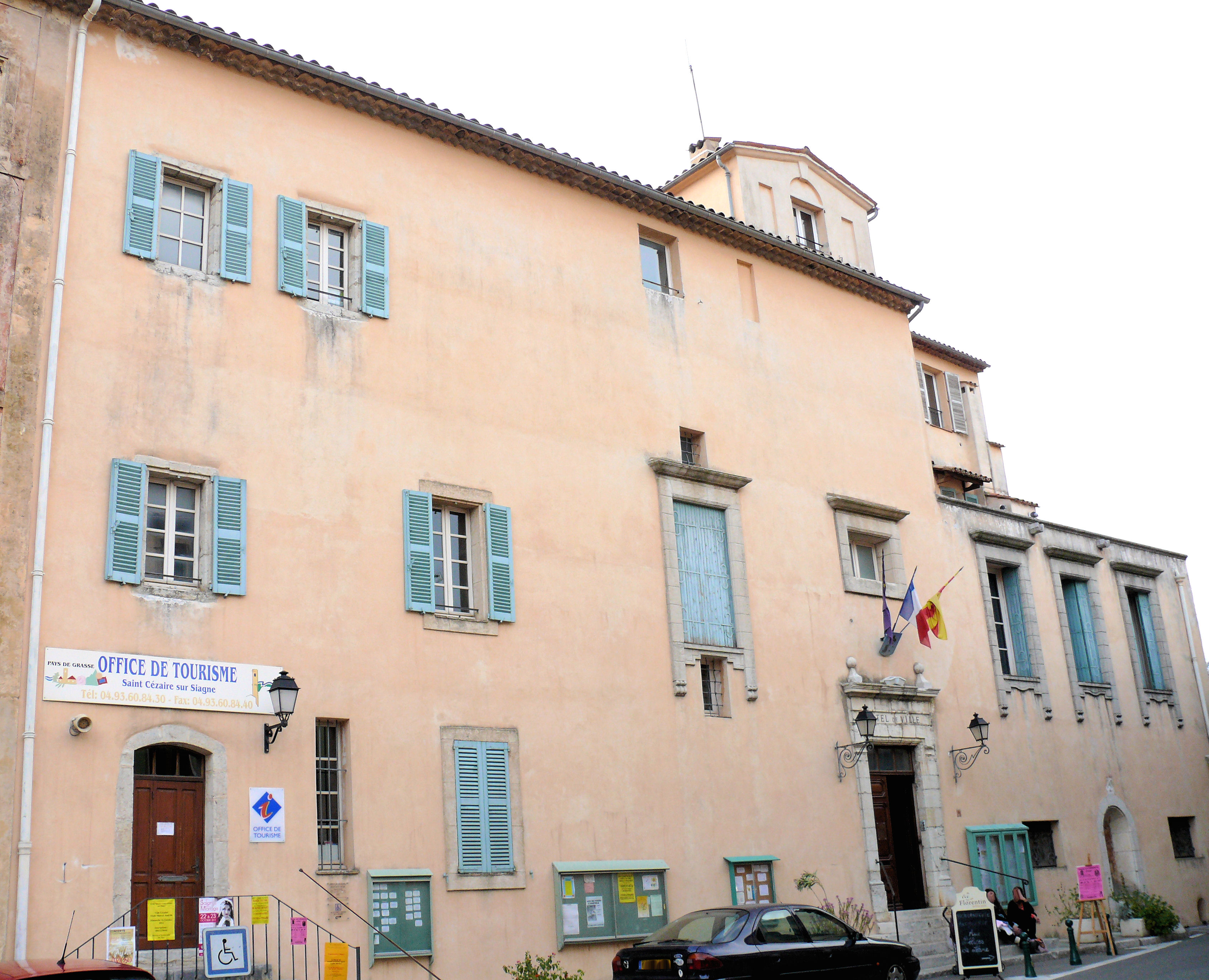 Saint-Cézaire-sur-Siagne - Hôtel de ville et office du tourisme